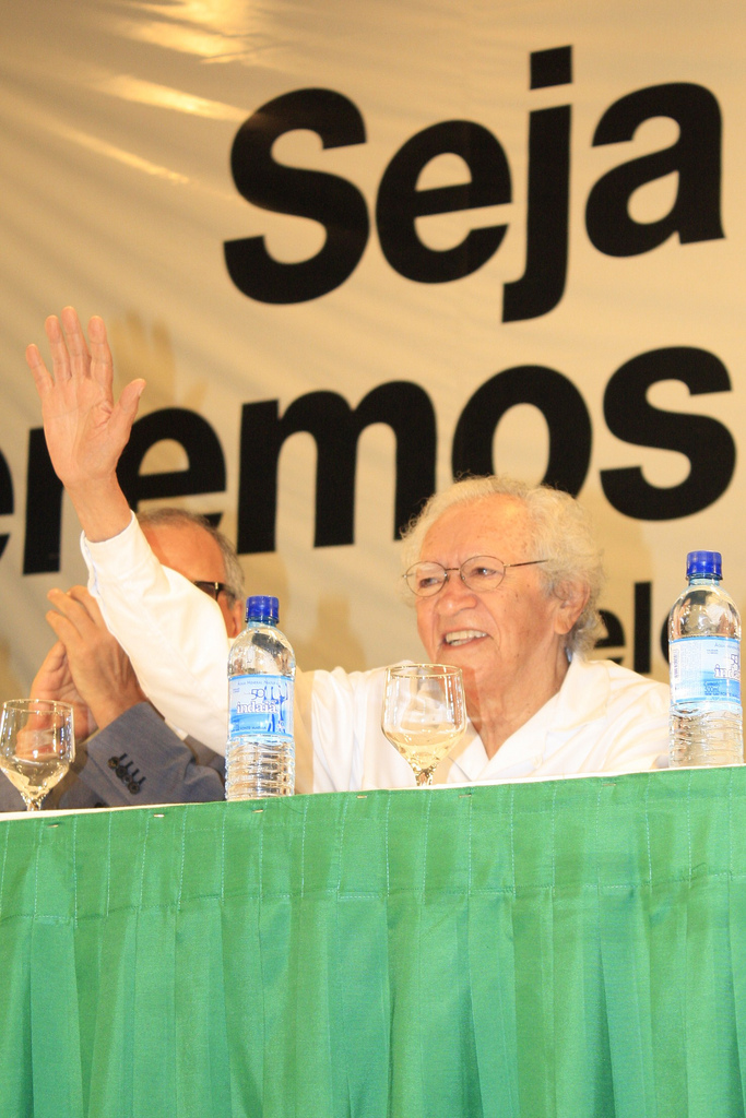 Thiago de Mello, poeta